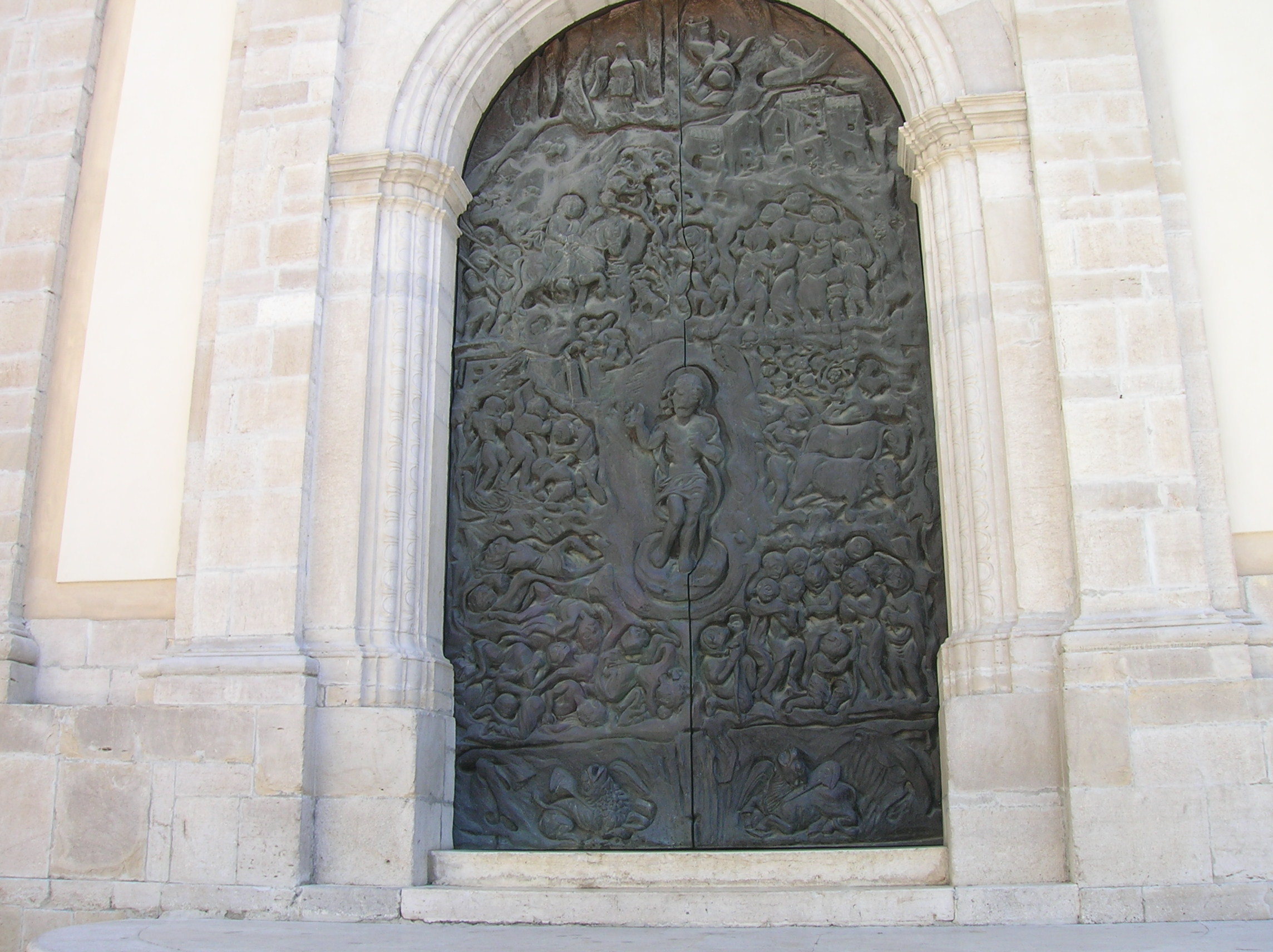 Portale maggiore della cattedrale.